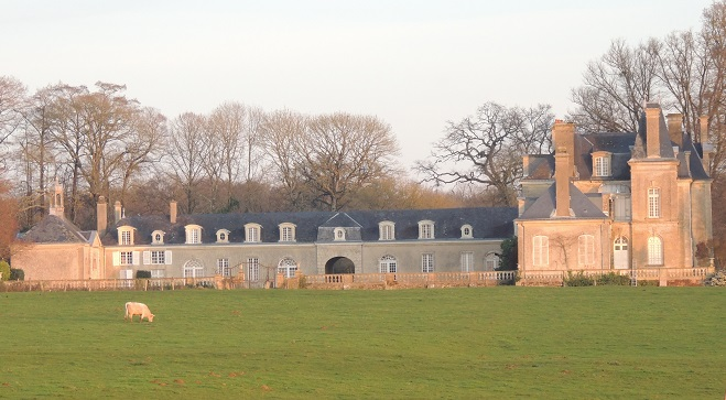 Château de Coulans au milieu du parc: pature avec une vache devant et grands arbres derrière